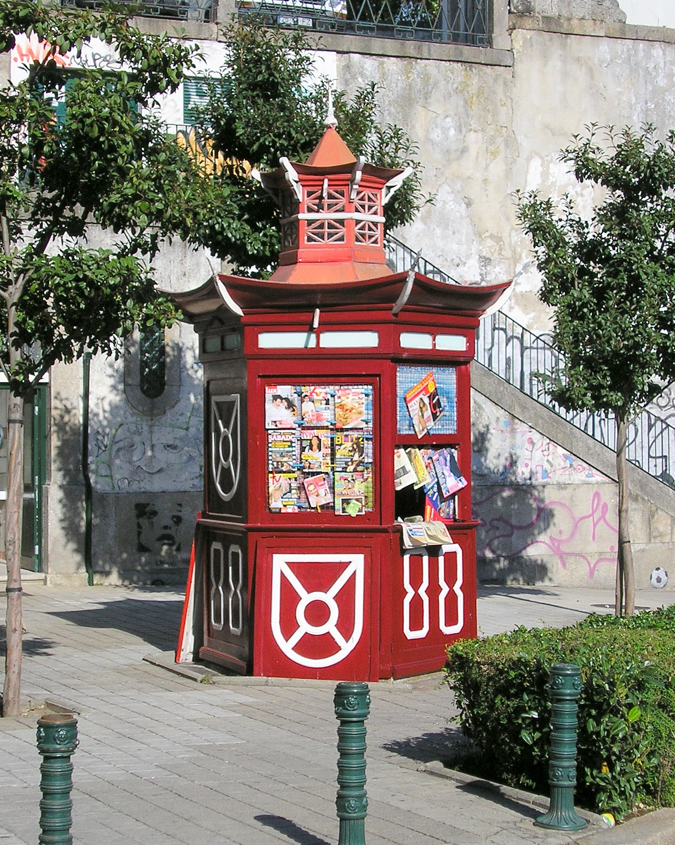 Traditional kiosk in Porto, Portugal